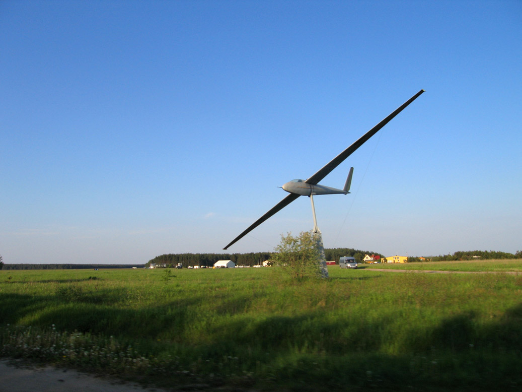 Paluknys airfield